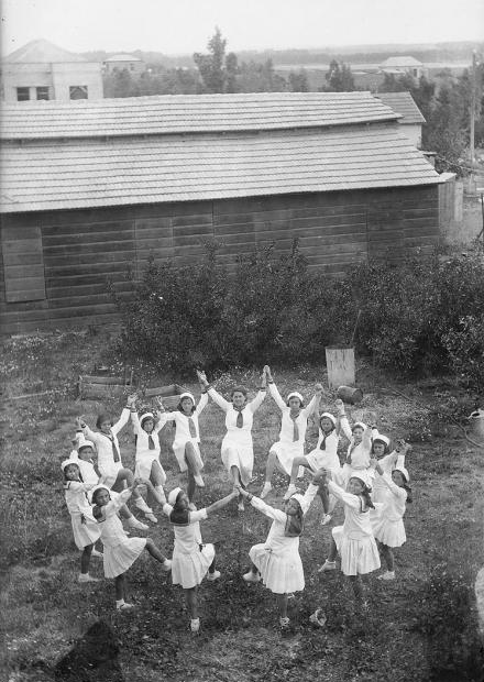 ט"ו באב בחדרה, תלמידות רוקדות עם המורה למחול פנינה סמסונוב (קנדריק)